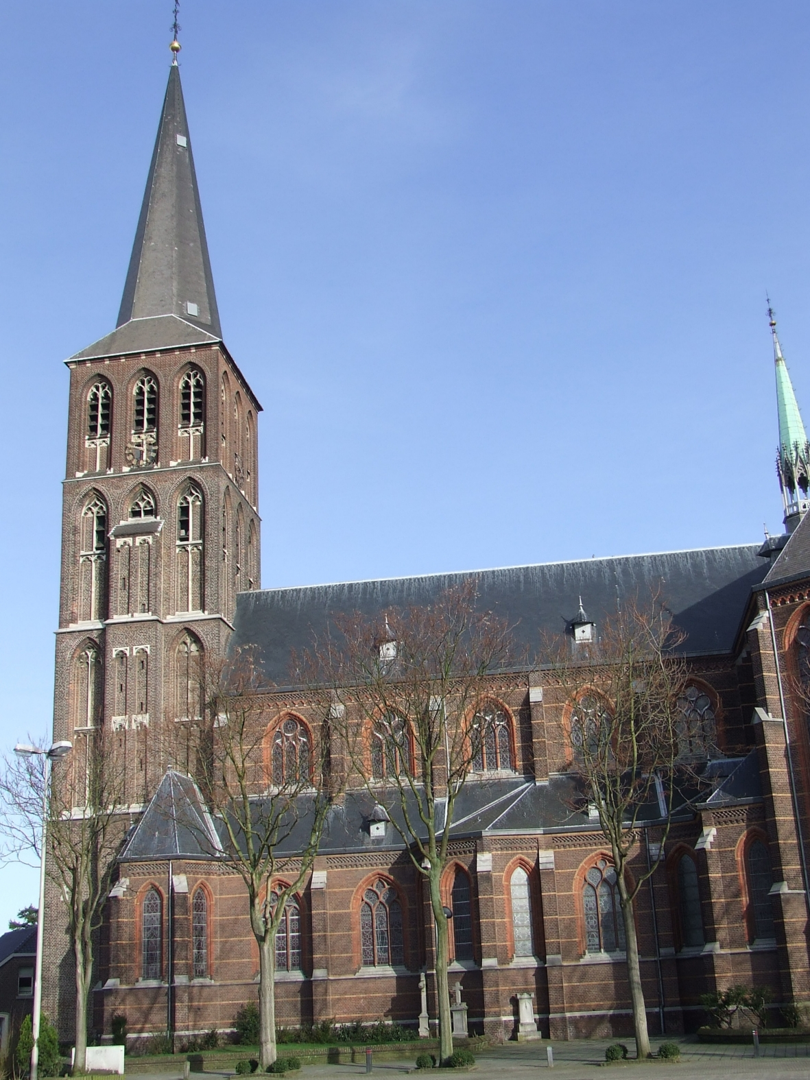 Sint-Martinuskerk in Tegelen is de hoofdkerk van de Gezamelijke Parochies van Tegelen, Steyl en Belfeld.